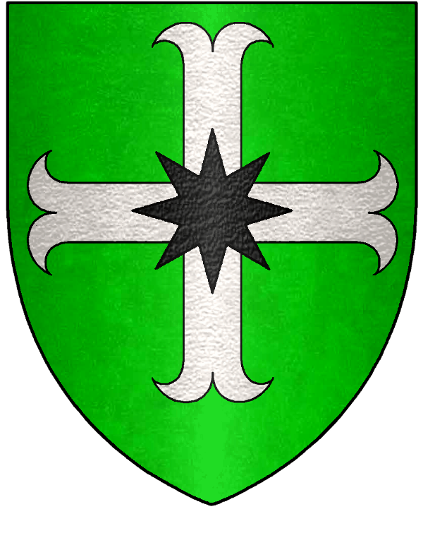 Blason de la Famille des Escures